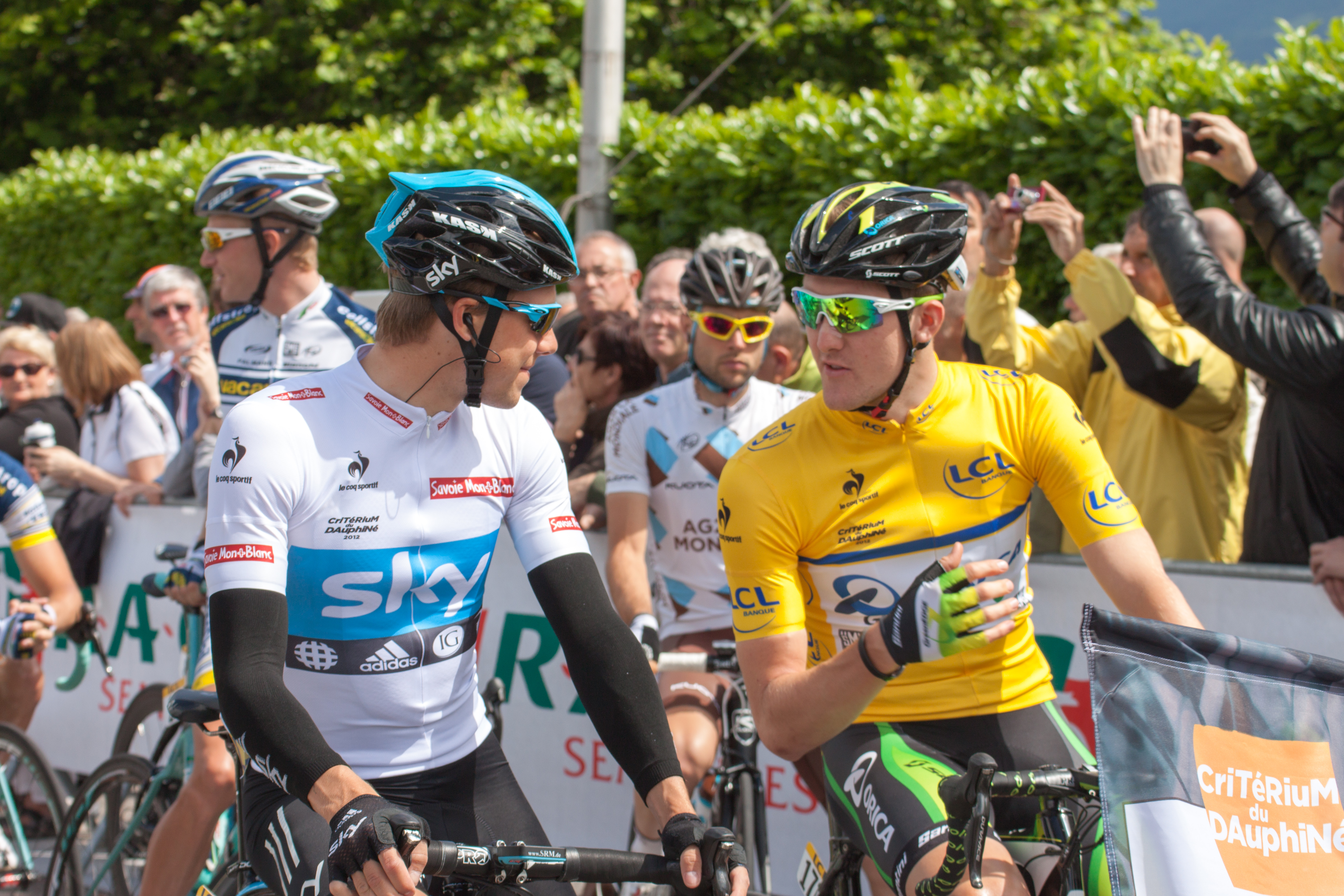 Edvald Boasson Hagen avec le maillot blanc, Luke Durbridge avec le maillot jaune sur la ligne de départ de la 1ere étape du Critérium du Dauphiné 2012